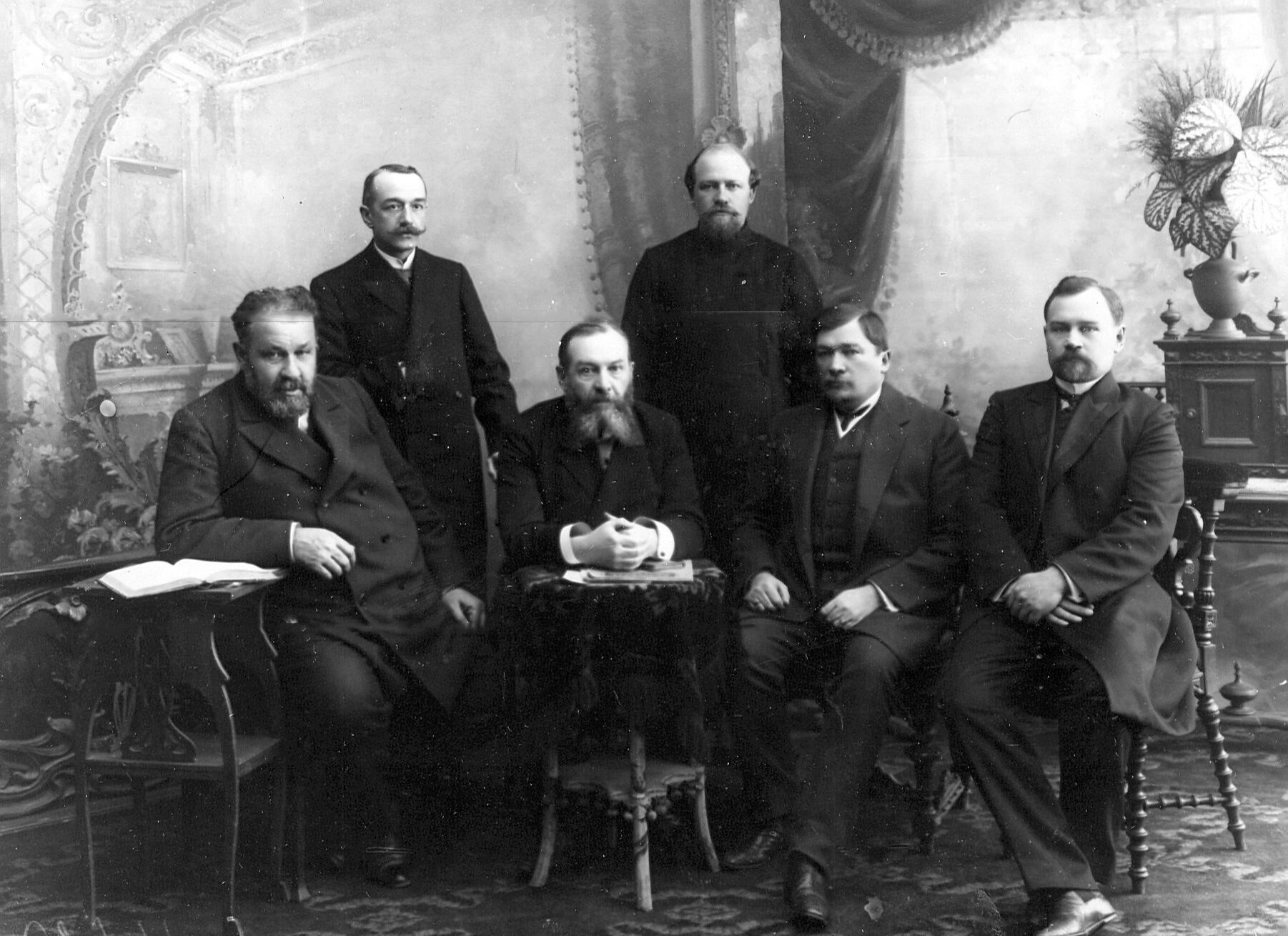 Депутаты Государственной думы Российской империи III созыва от Симбирской губернии Стоят: Протопопов А.Д., Сиротов Д.И. Сидят: Пантусов П.А., Мотовилов А.А., Березовский А.Е., Быков А.Г.